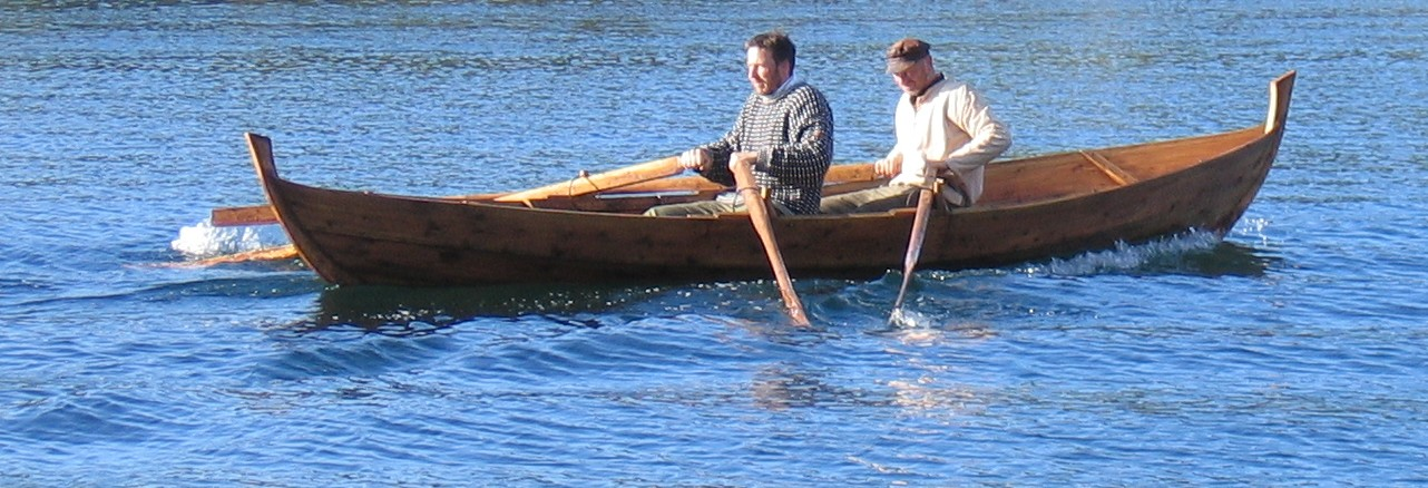 To mann ror sunnmørsfæring